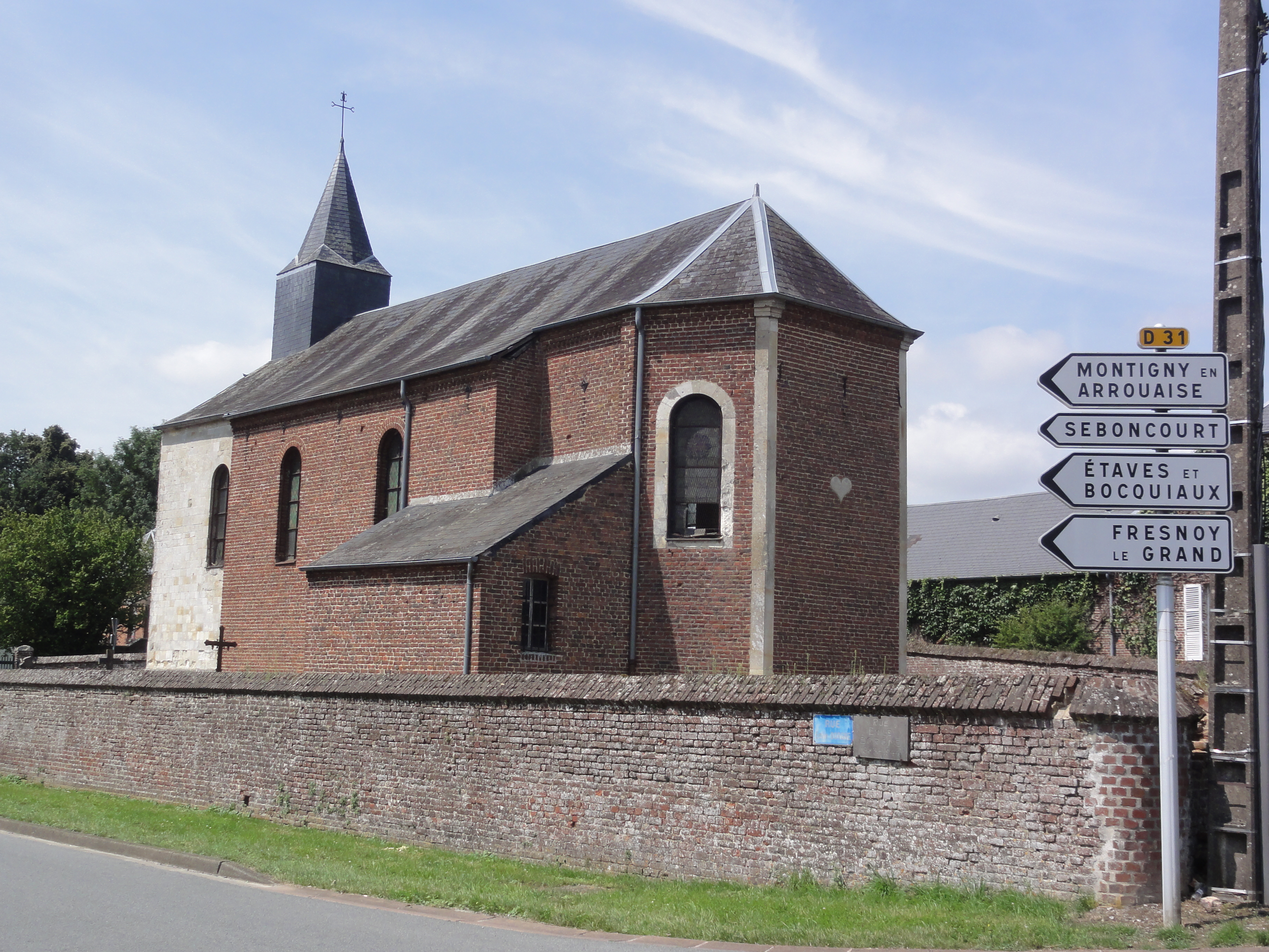 Aisonville-et-Bernoville (Aisne) église du village